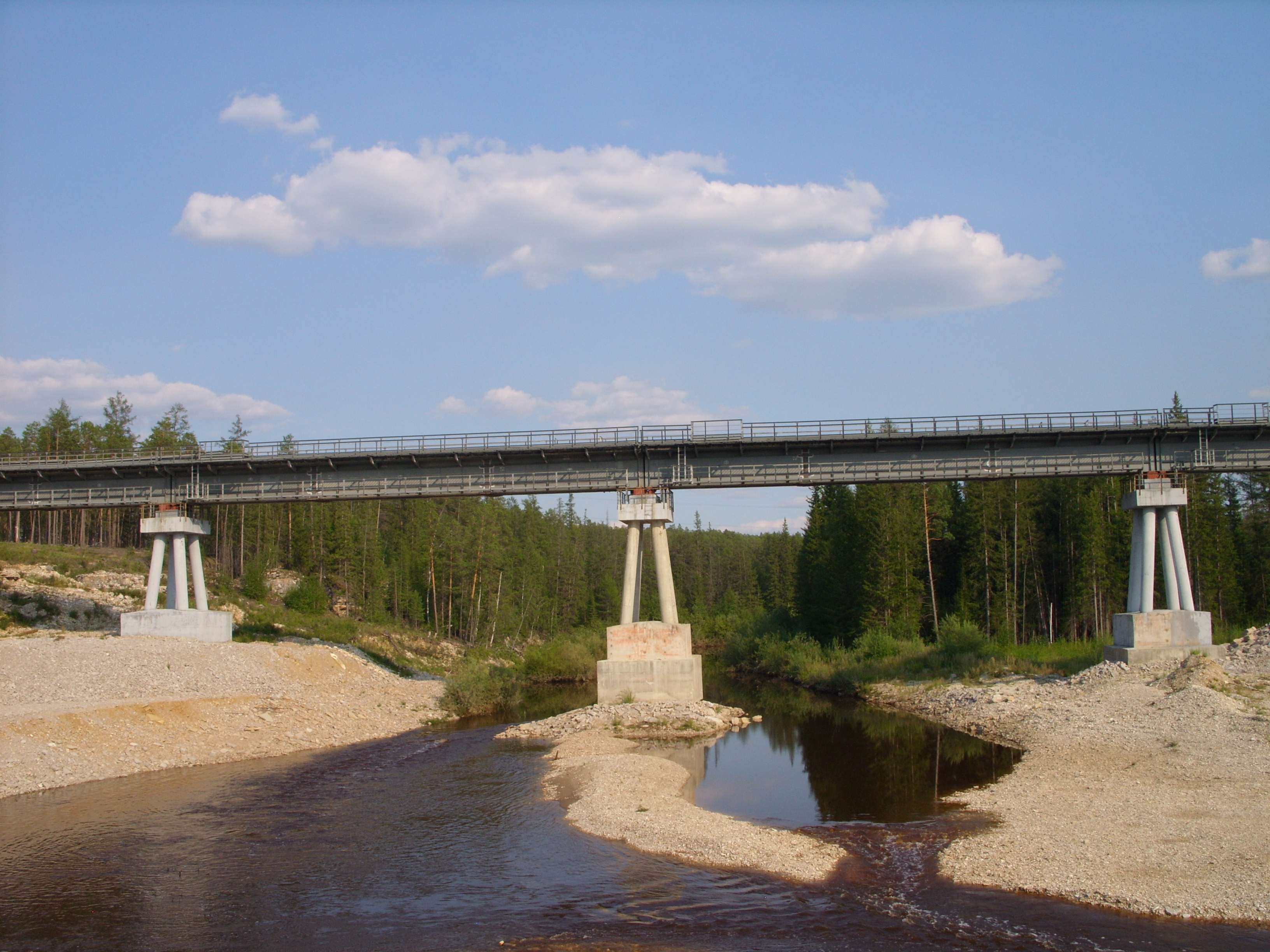 ЖД мост через реку Лютенге (Лютенга), Хангаласский район, Якутия